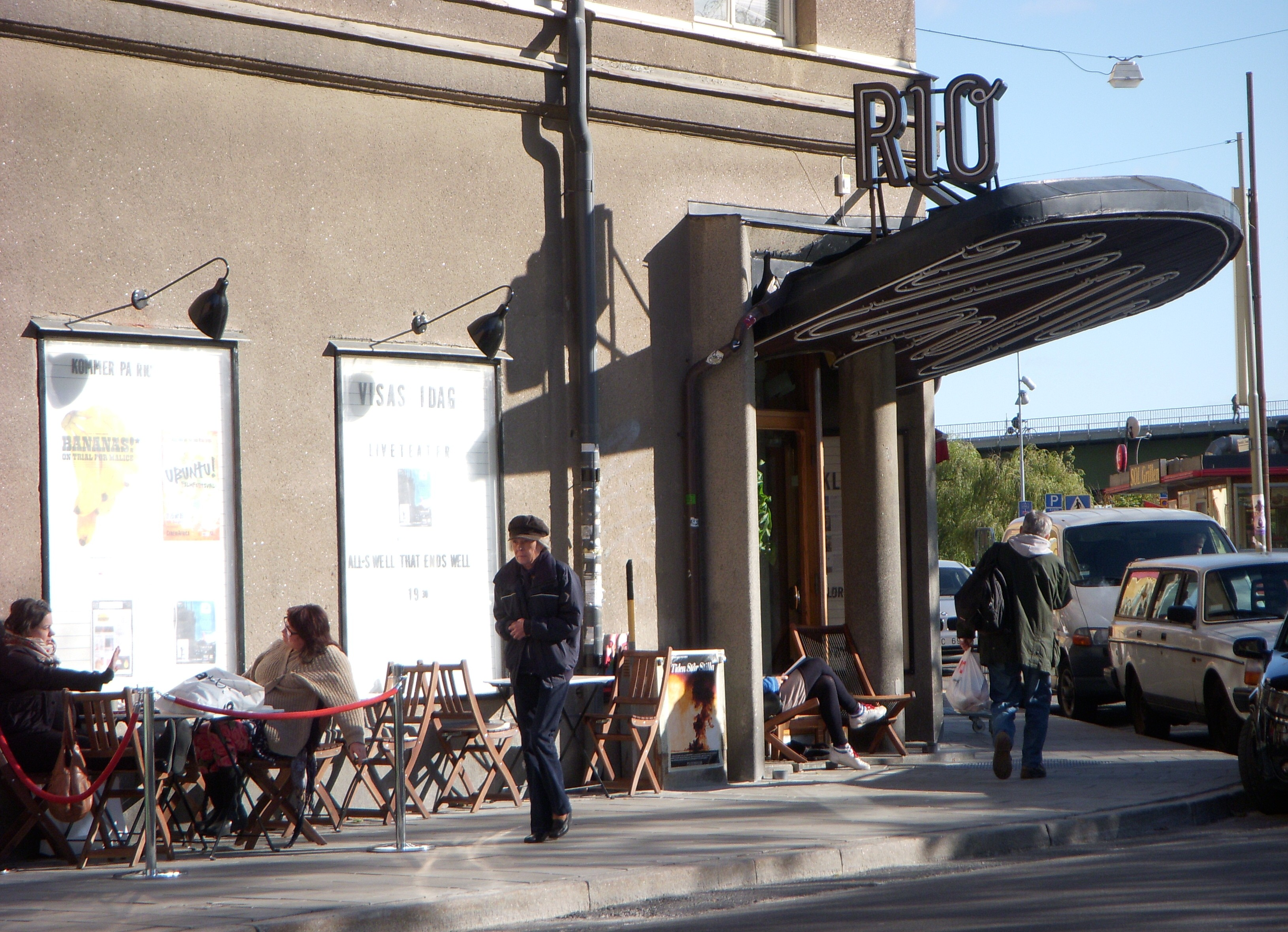 Biografen RIO vid Hornstulls strand, Södermalm, exteriör